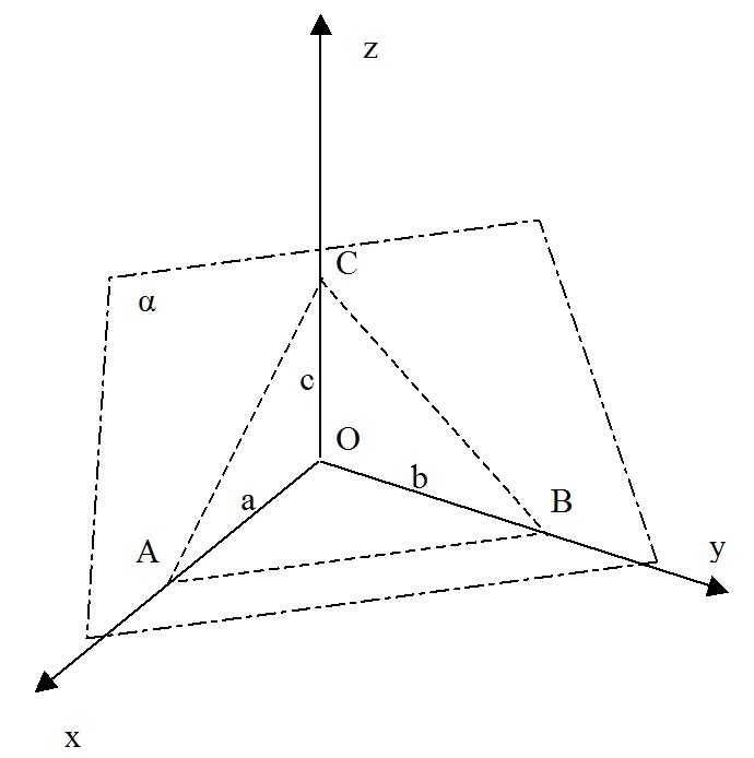 Schema esemplificativo del rapporto parametrico per spiegazione della Legge di Haüy.